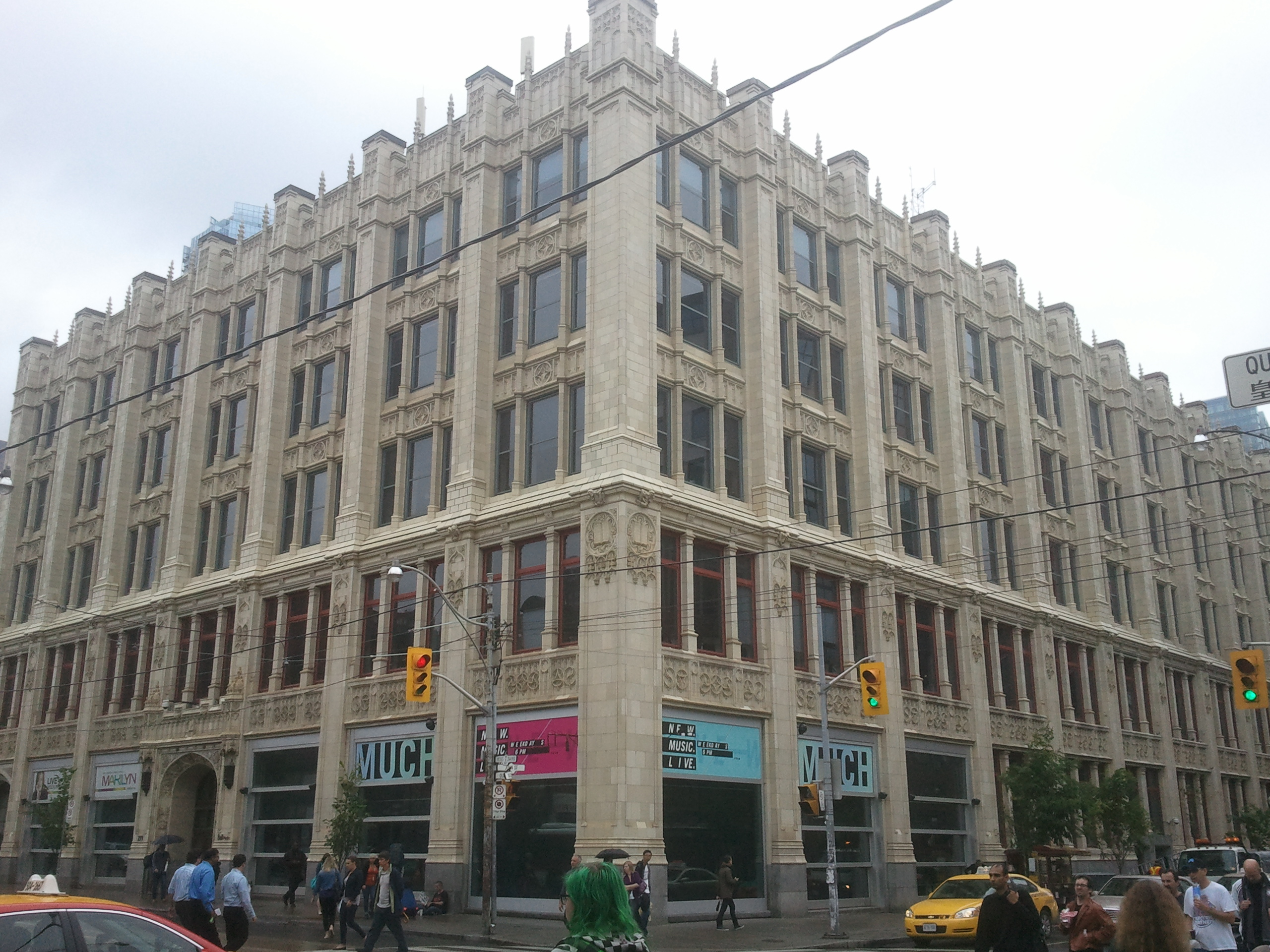 Wesley Building